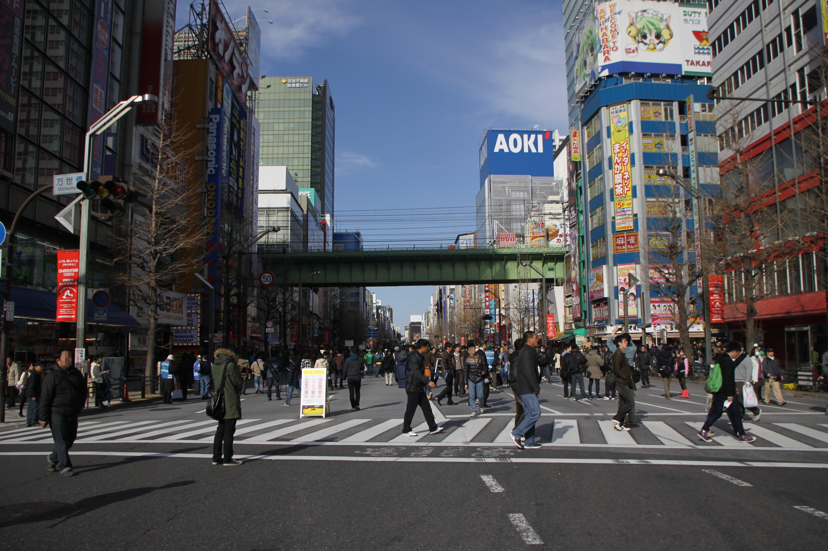 暫定的に復活した秋葉原の歩行者天国